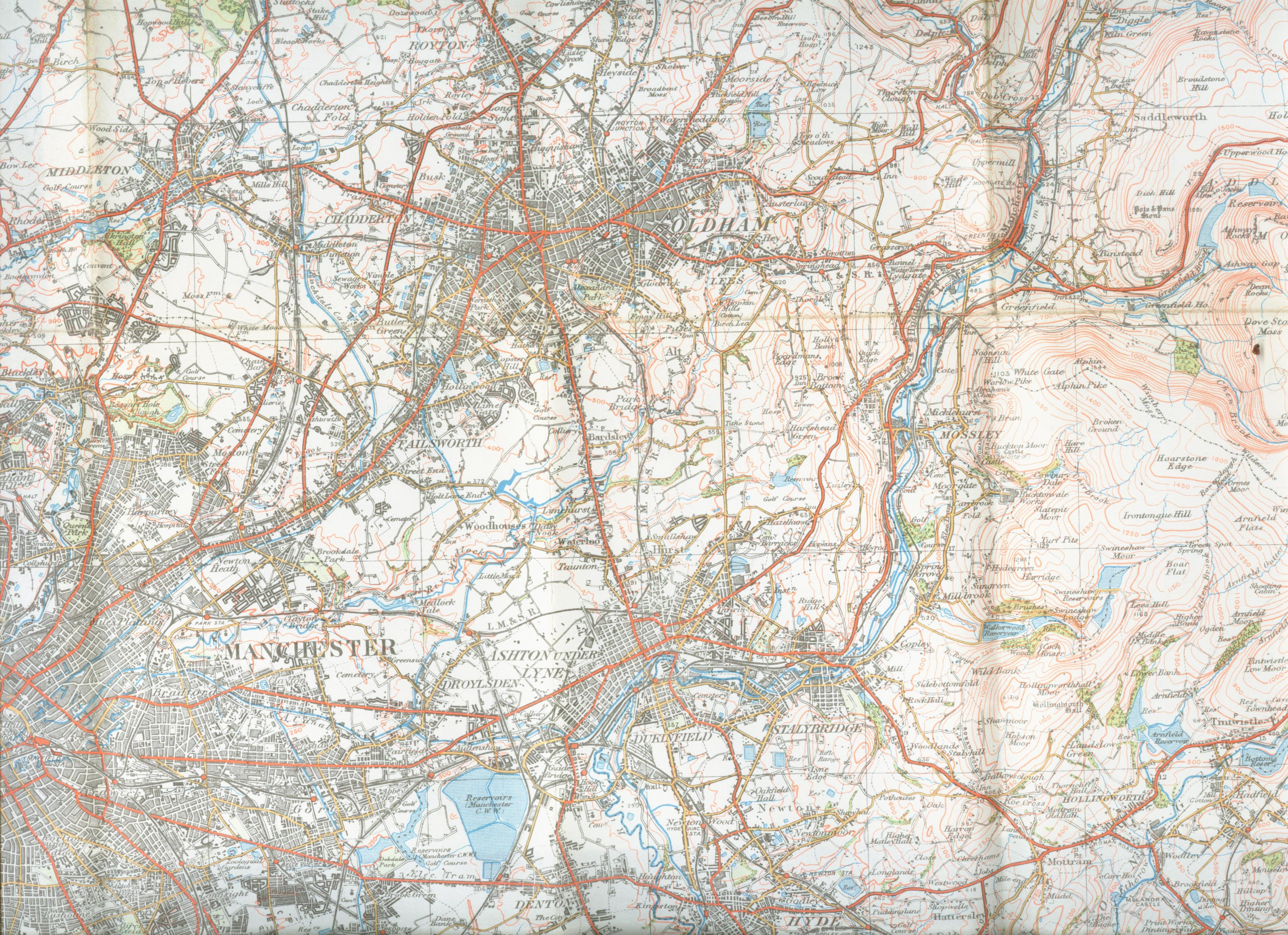 old OS map